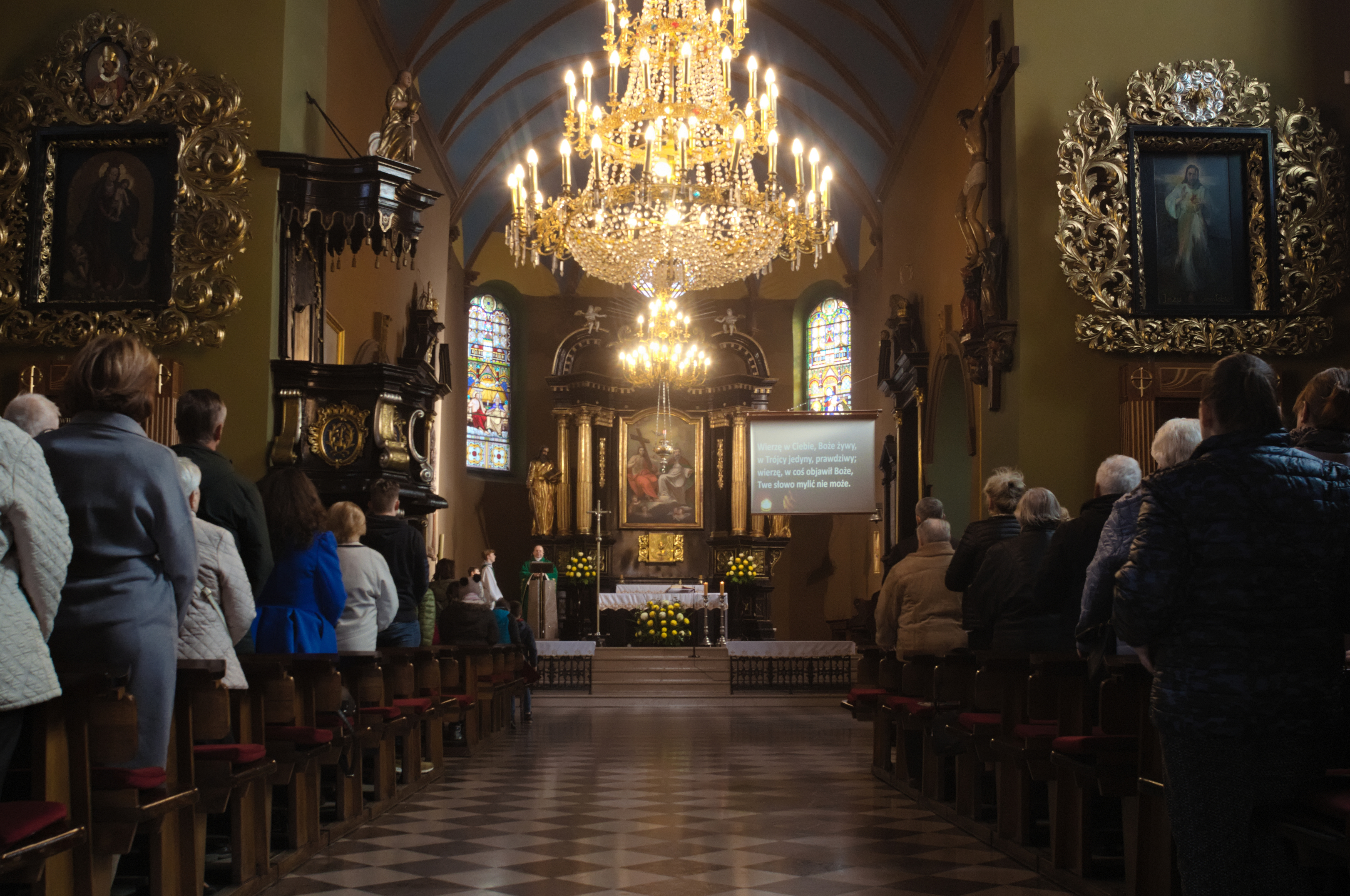 wnętrze kościoła Trójcy Przenajświętszej w Będzinie podczas niedzielnej mszy